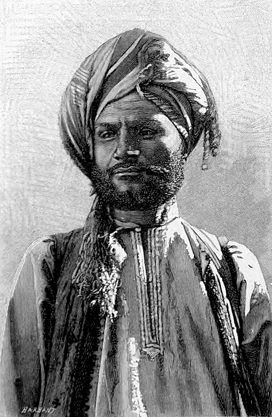 Original caption: "Négociant musulman de Mascate"